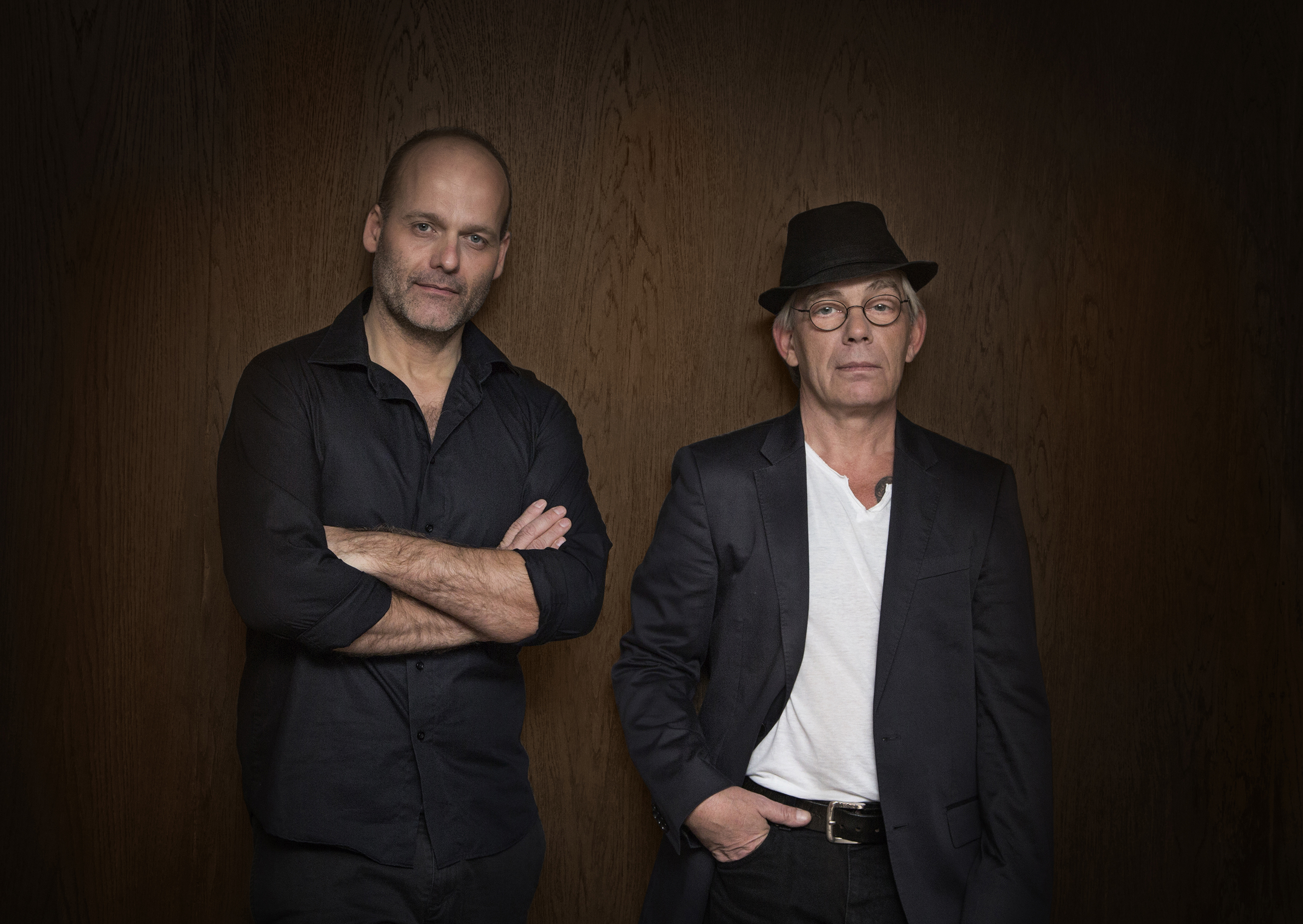 Holtsø & Wittrock